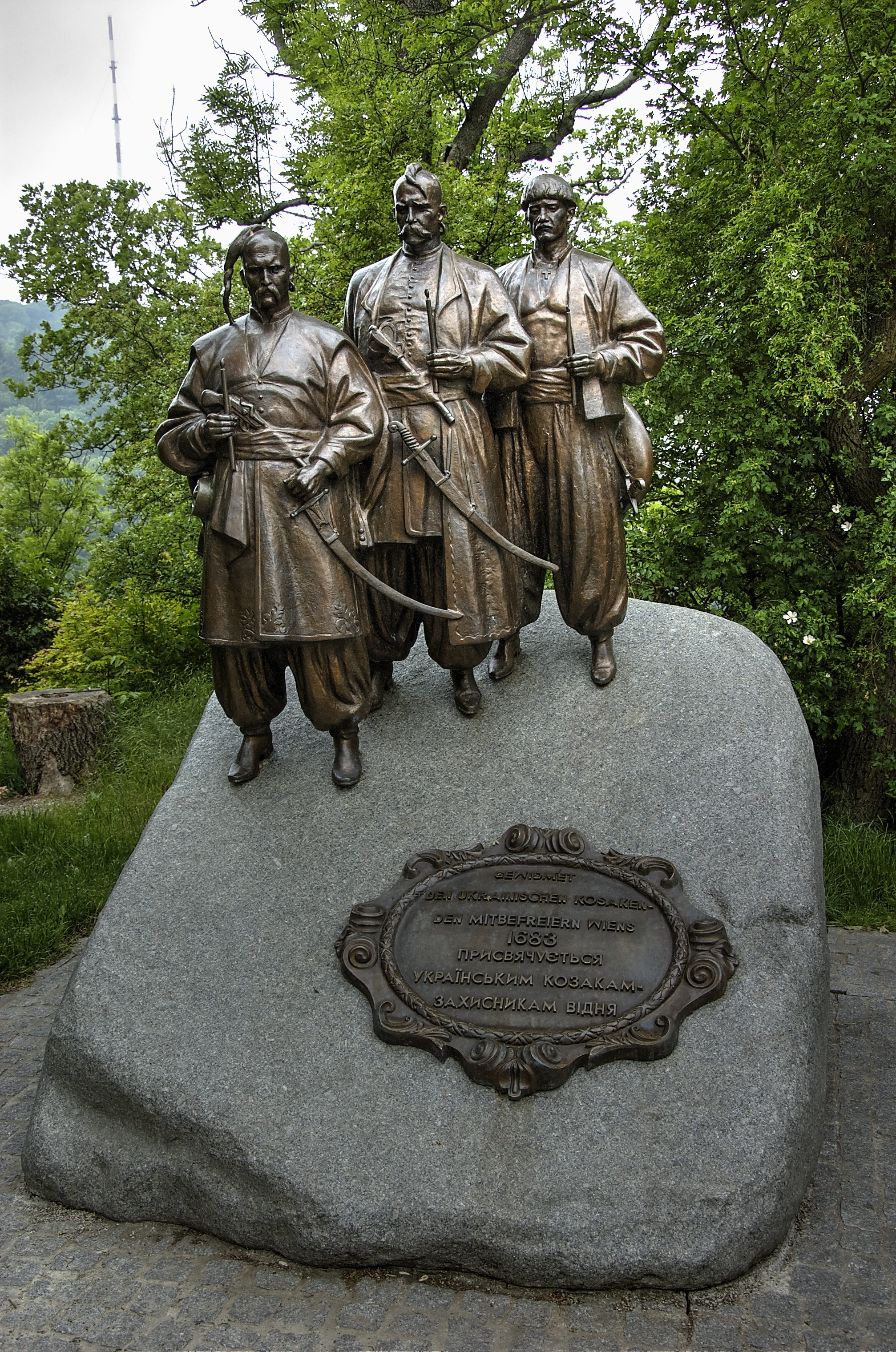 Denkmal für ukrainische Kosaken auf dem Leopoldsberg